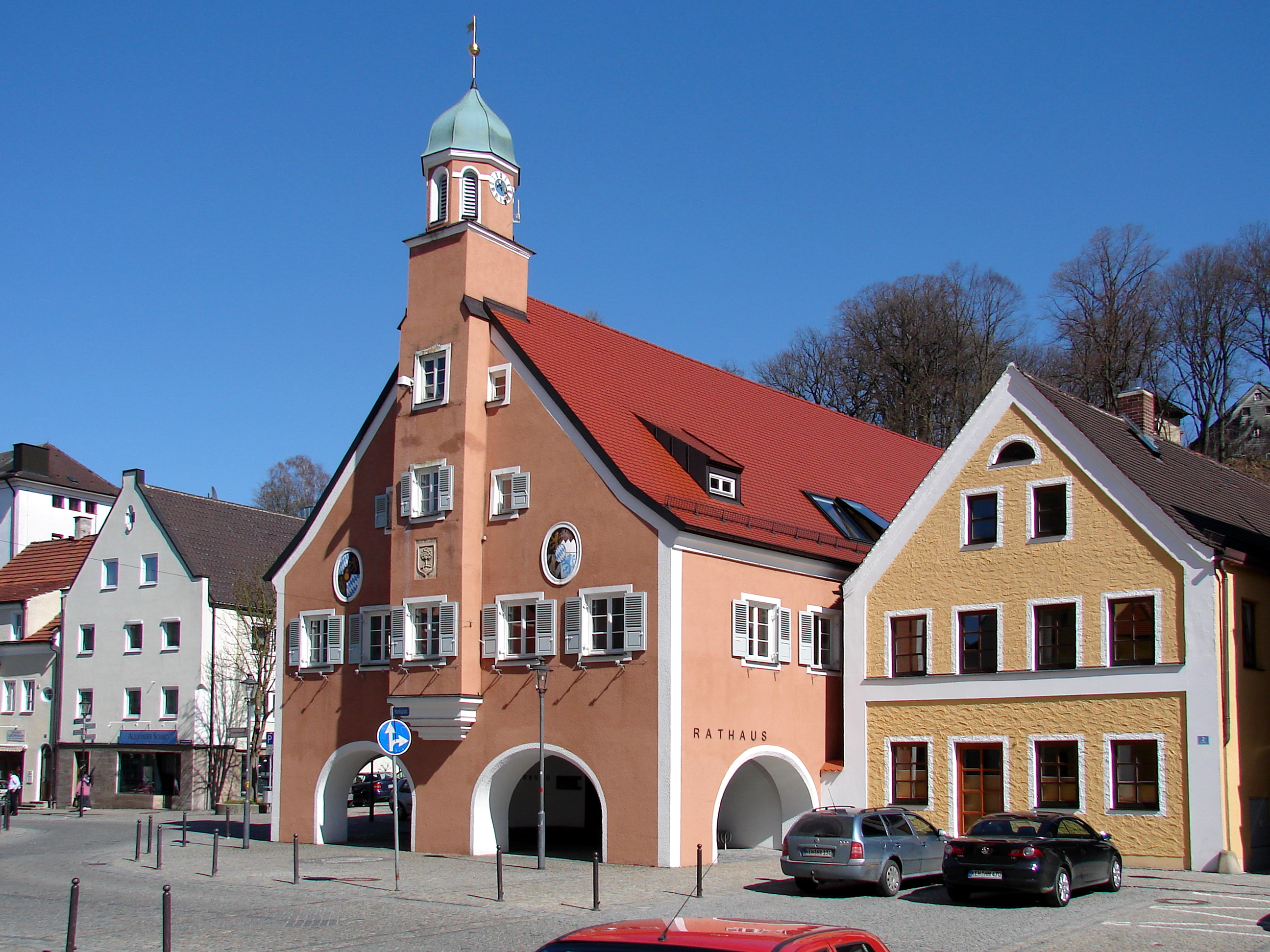 Mainburg, Rathaus